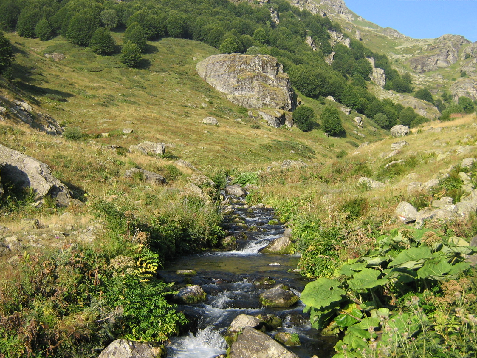 Боговињска Река низводно од Боговињското Езеро